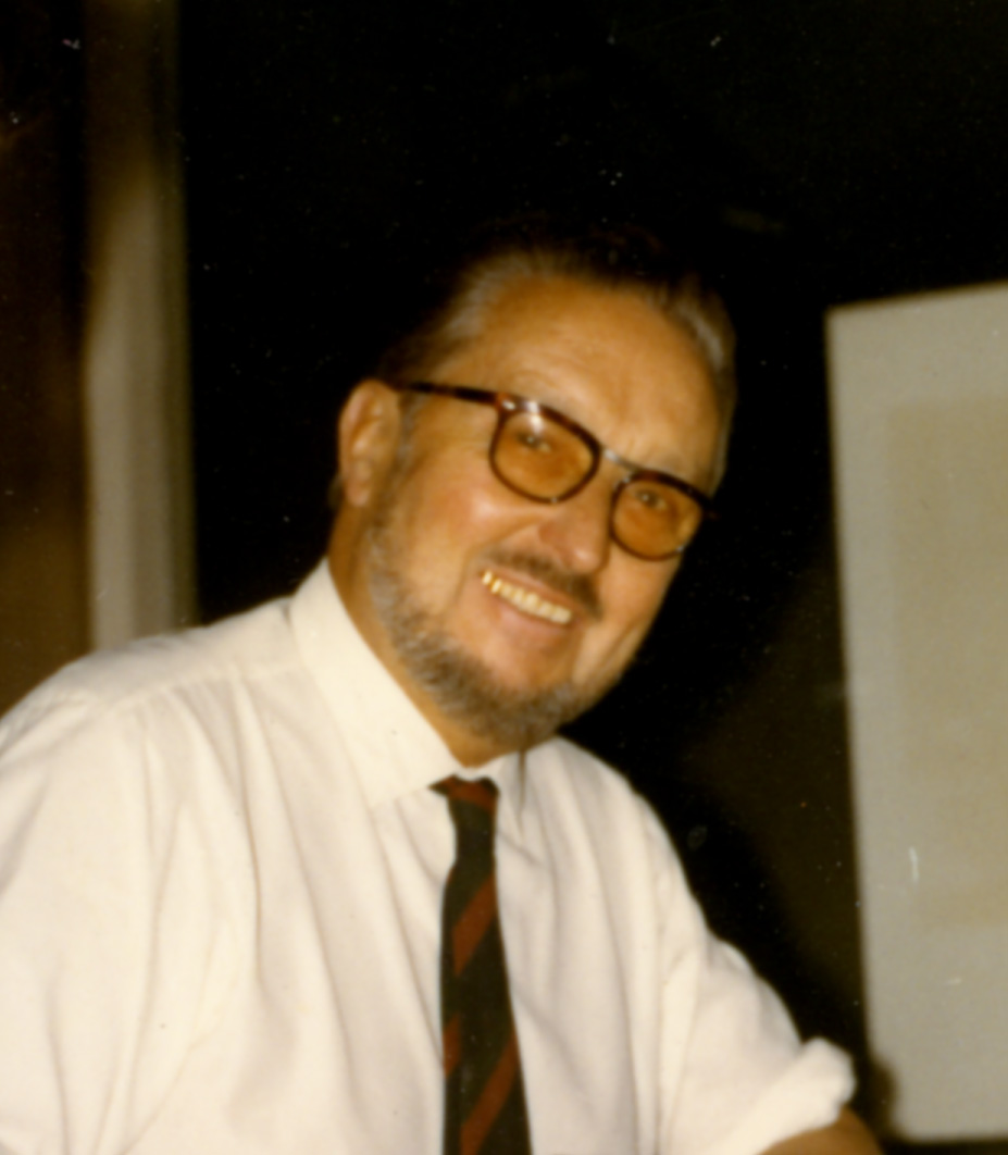 Portrait de Maxime Old en 1971 collection privé de Olivier Old